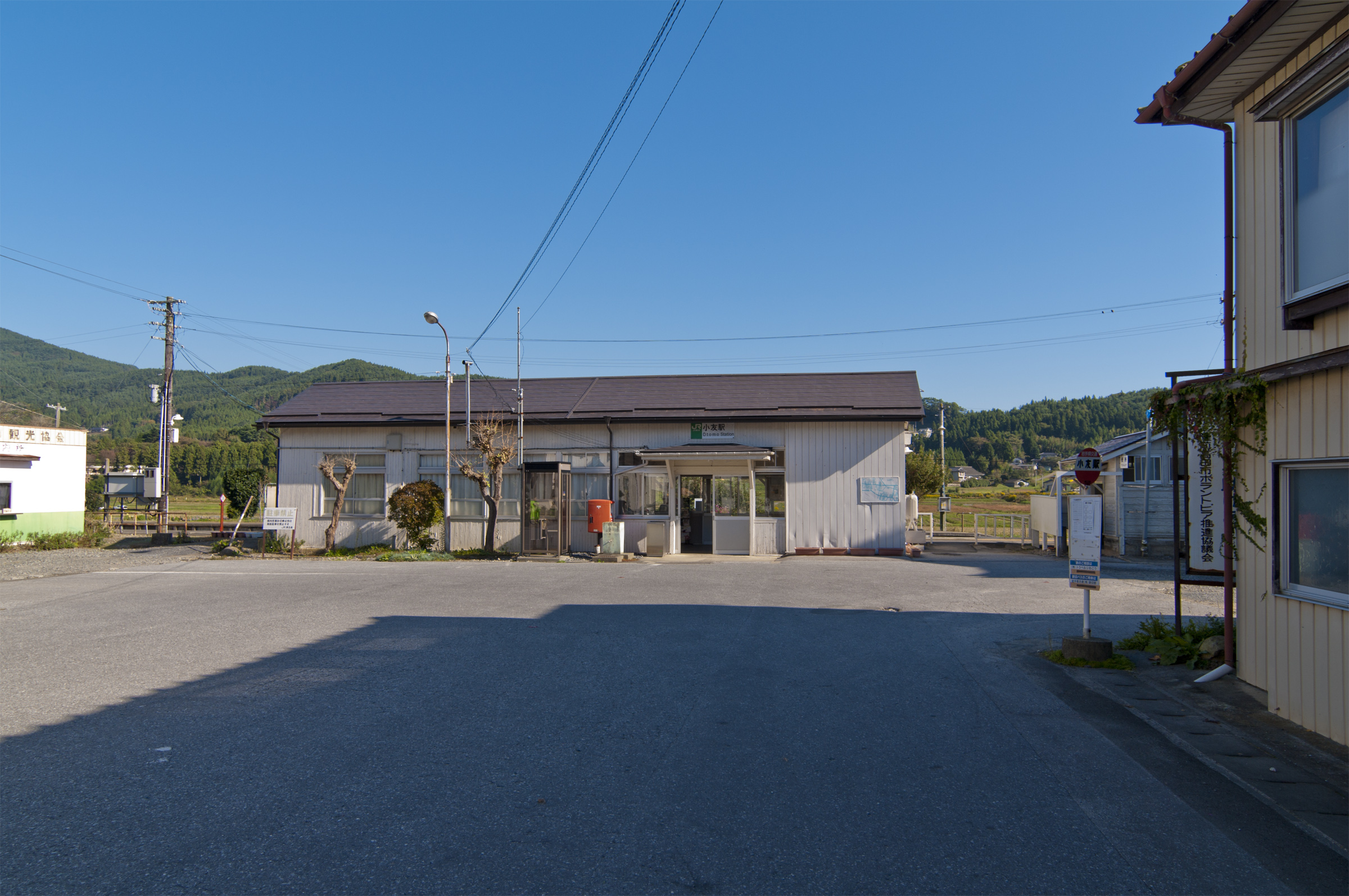 東日本旅客鉄道大船渡線小友駅駅舎 東日本大震災前の様子